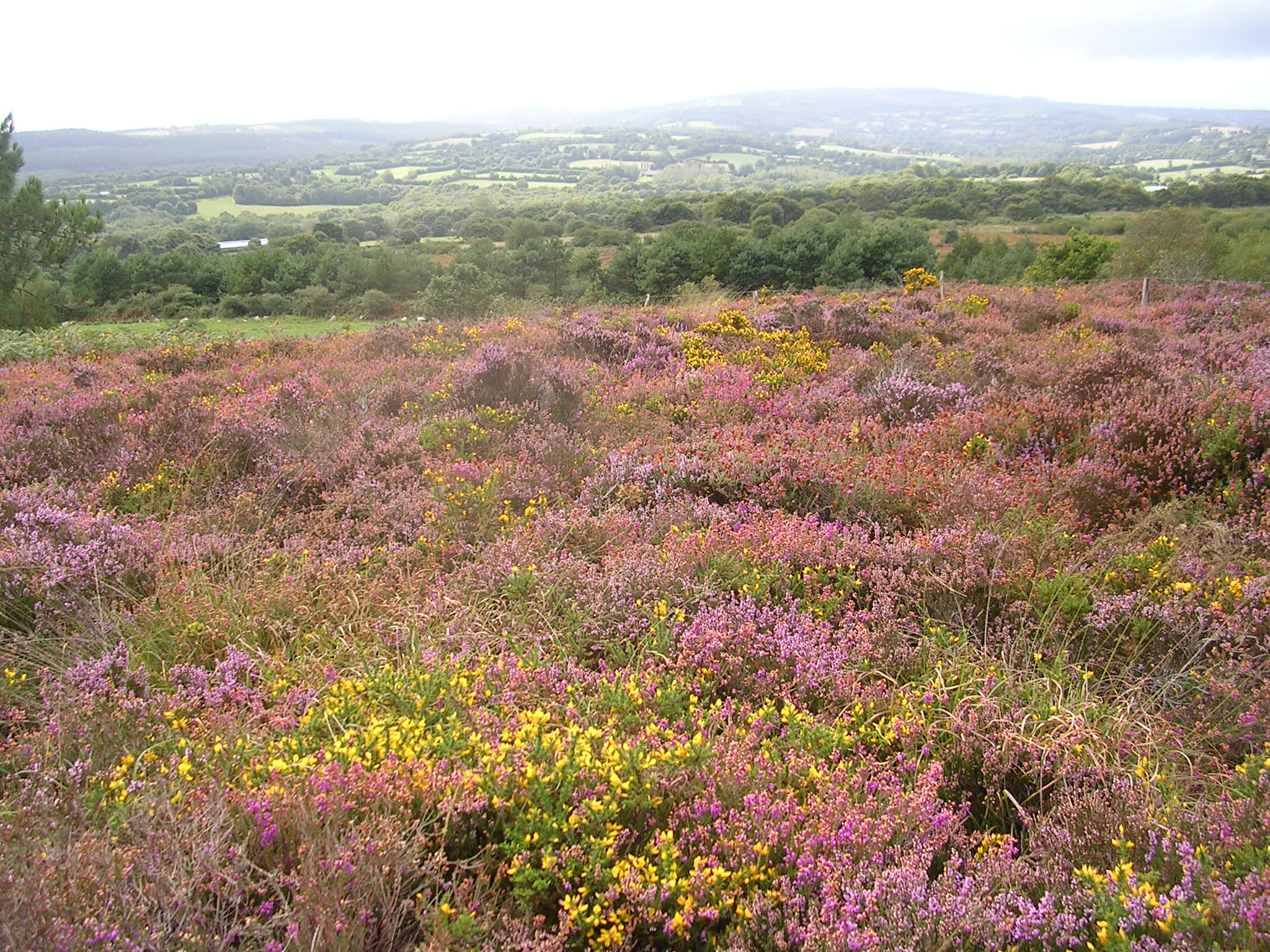 Paysage typique de la réserve